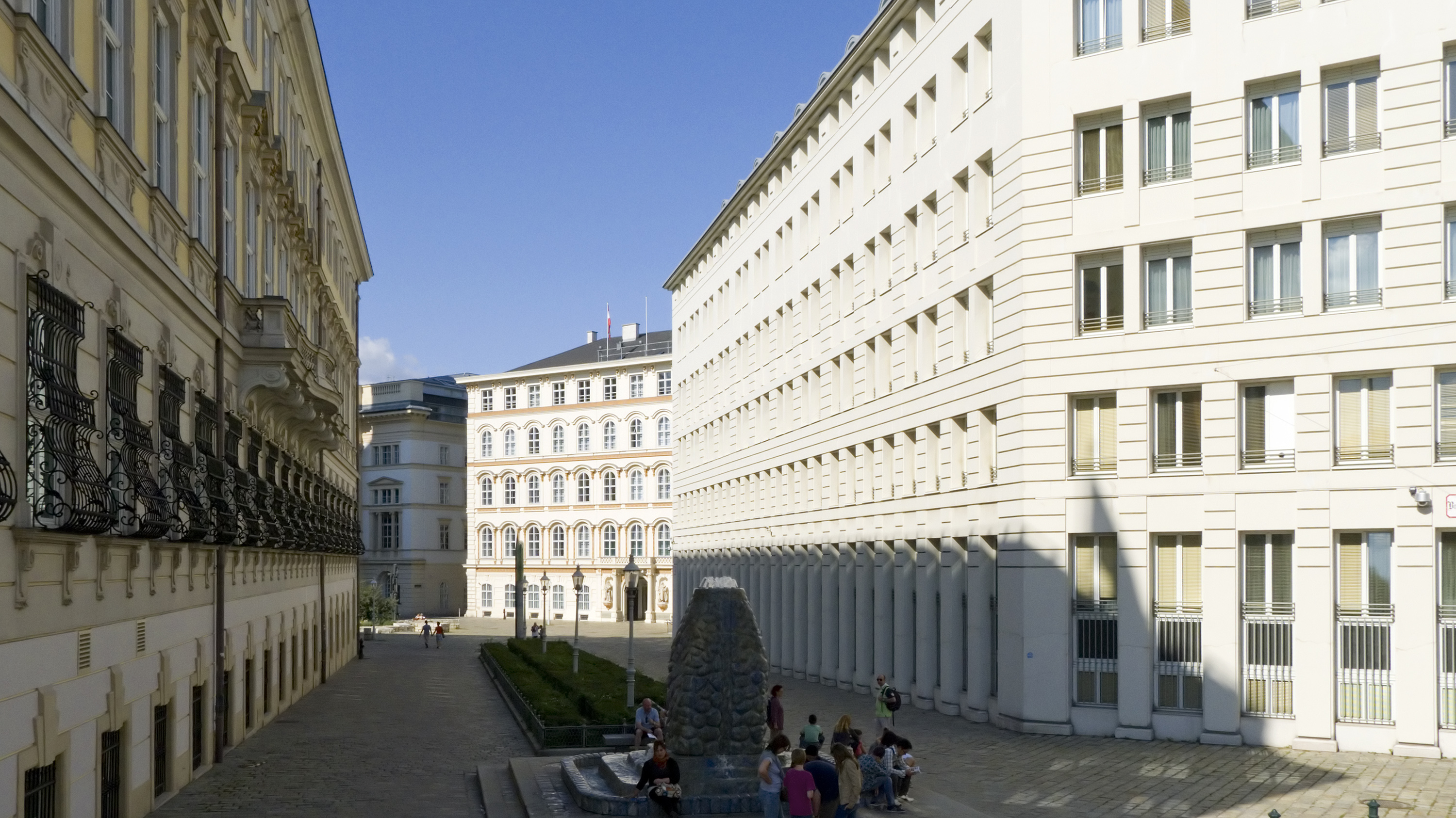 Bruno-Kreisky-Gasse in Wien 1 beim Ballhausplatz Richtung Nordosten